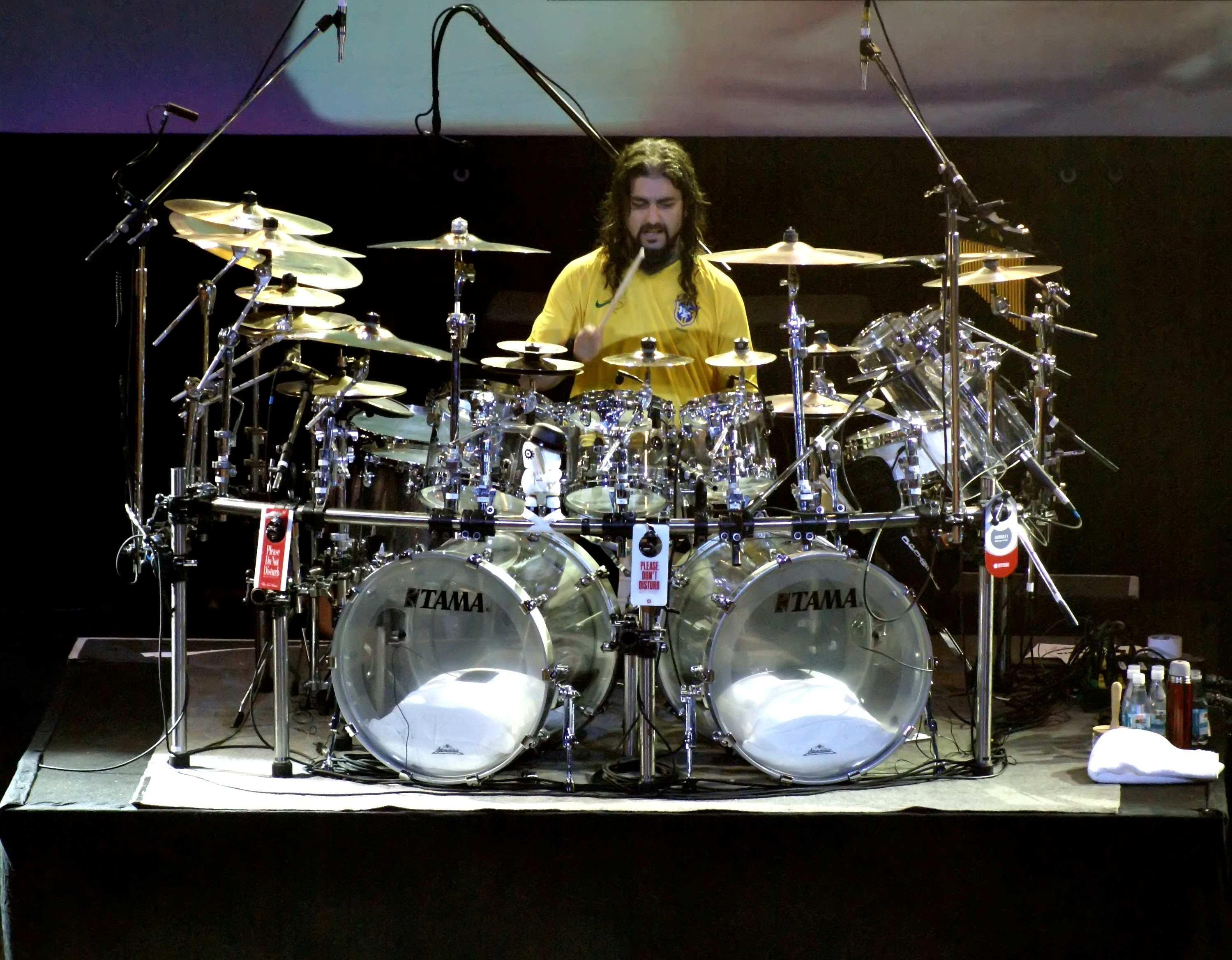 Mike Portnoy. Show Dream Theater no Rio de Janeiro dia 07/03/2008 Fotos tiradas do camarote central. Melhor banda da atualidade.